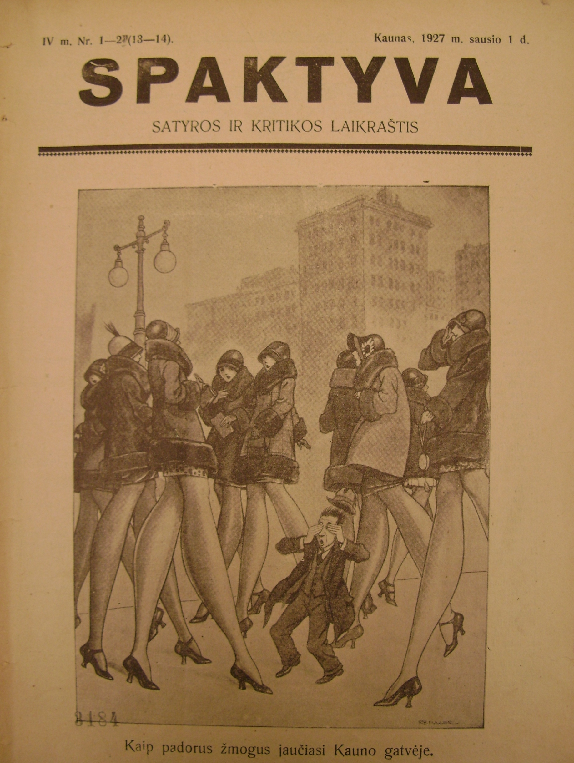 Satyrinis žurnalas "Spaktyva"